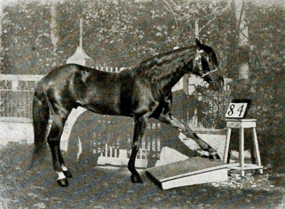 der kluge Hans gibt am Tretbrett eine Zahl an